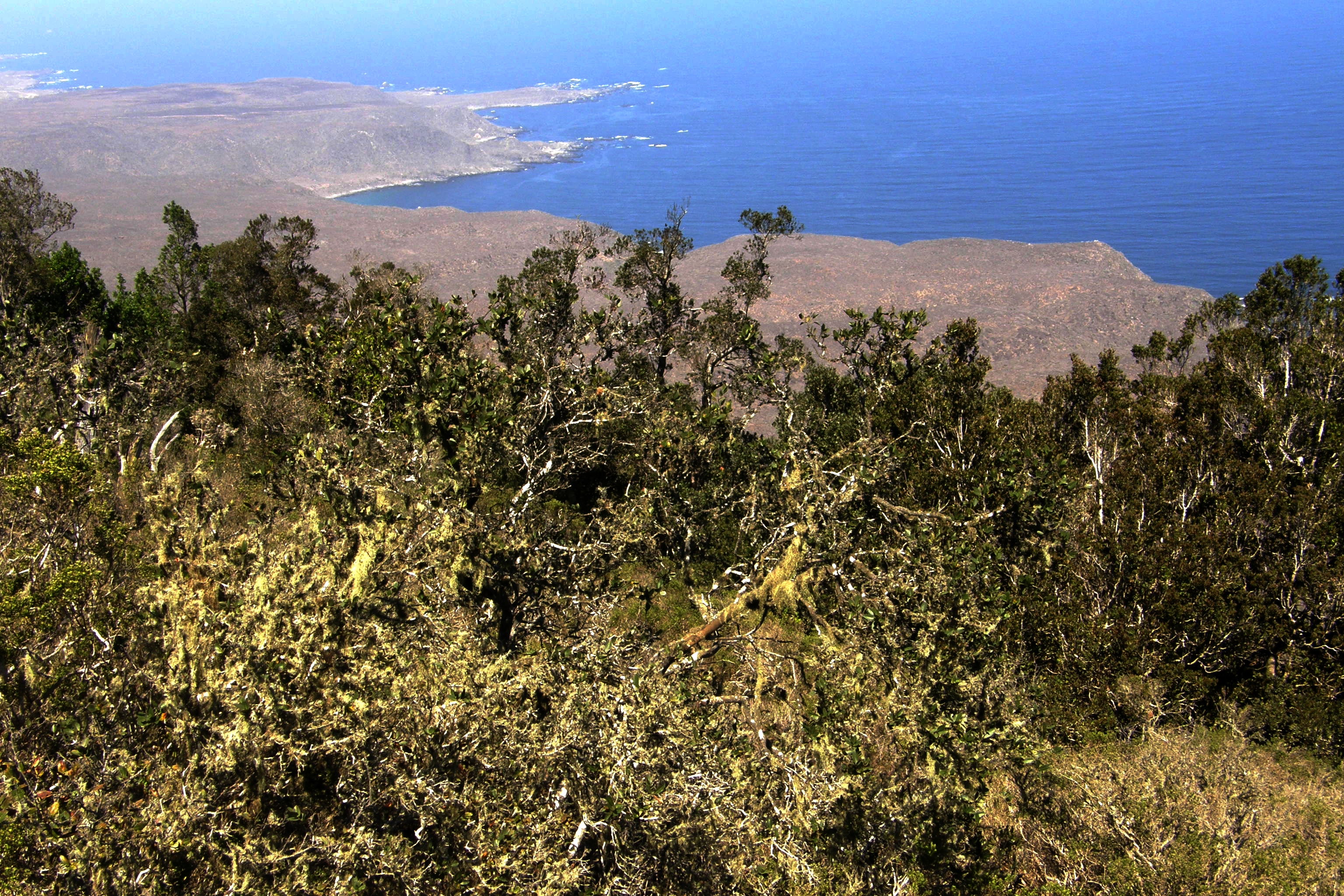 Parc National Fray Jorge, commune d'Ovalle, province de Limari, région IV, Chili